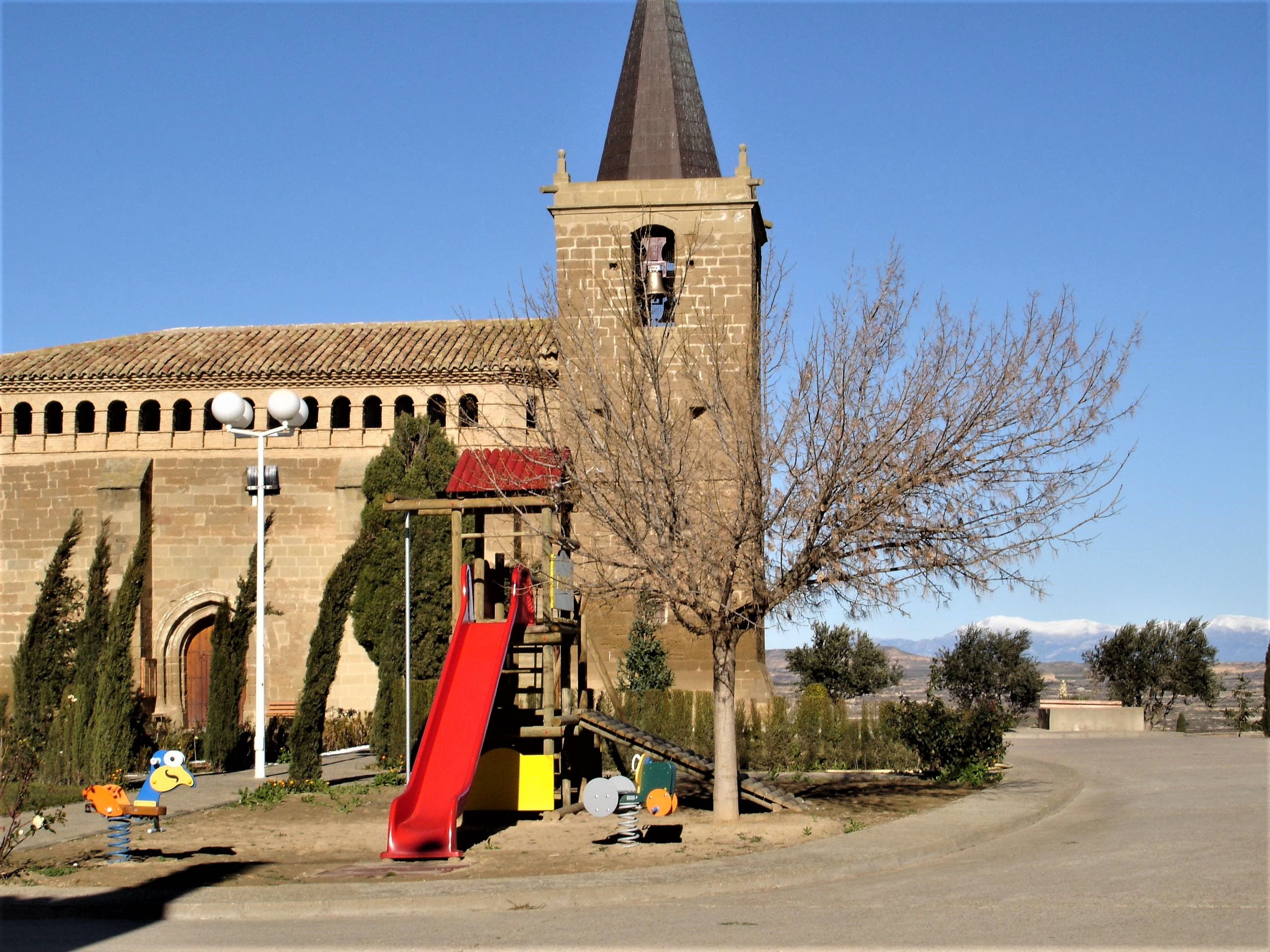 Vista del soltador e iglesia de San Juan Bautista de Capdesaso (los Monegros, Huesca), con la Sierra de Guara en el horizonte